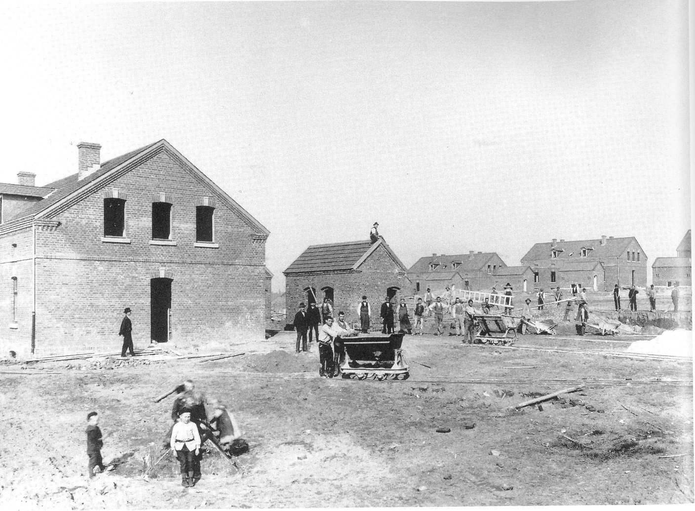 Siedlung Eisenheim Stemmersberg im Bau, um 1900 Gleichzeitig wurde auch der selbe Typ in Eisenheim gebaut